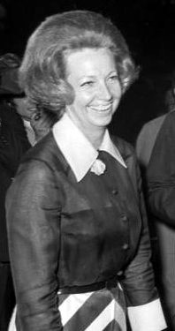 Rut Brandt GND 119060078